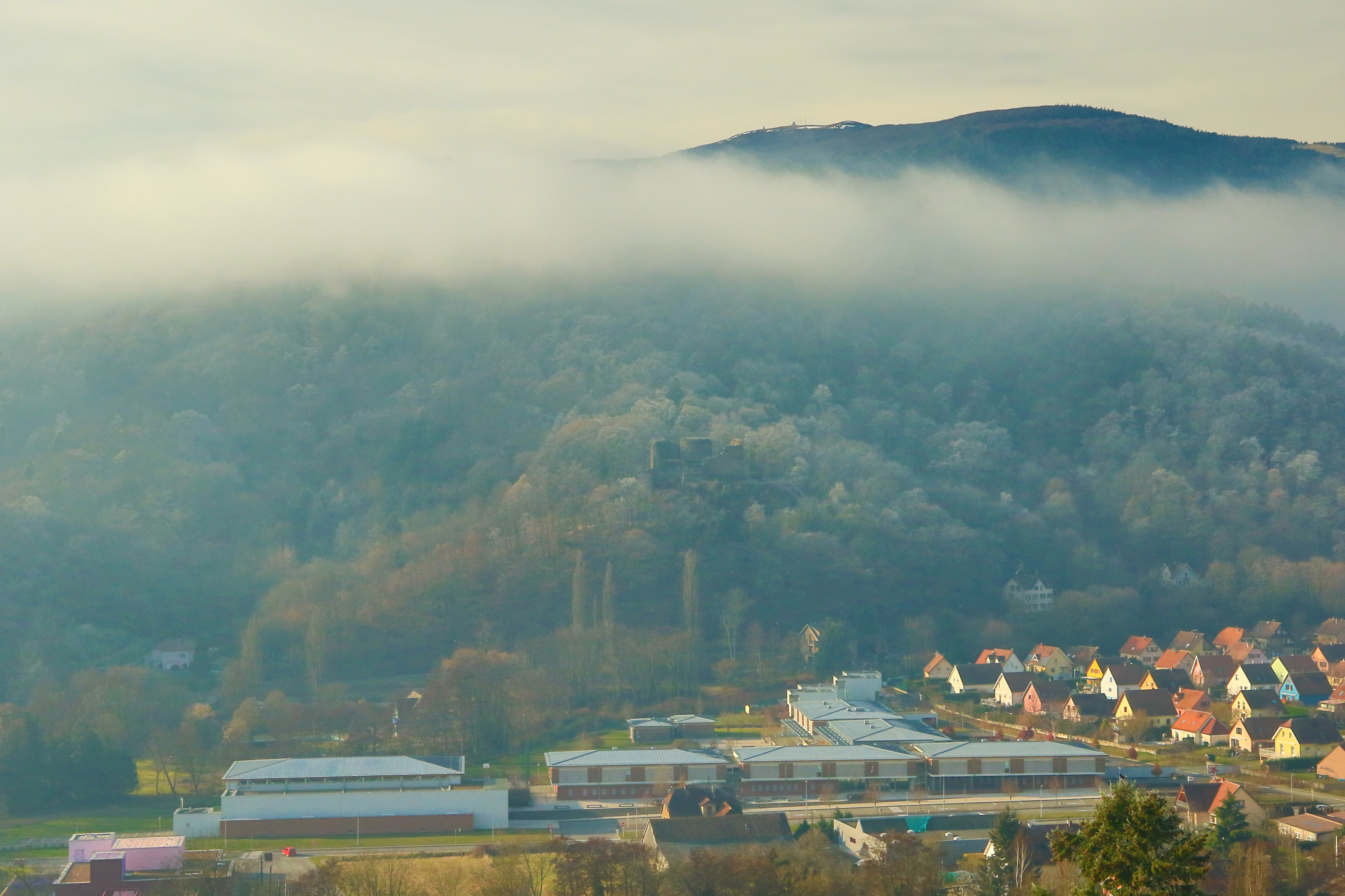 Vue d'ensemble du village, avec le château du HUGSTEIN, ainsi que le sommet du Grand-Ballon, en arrière-plan.